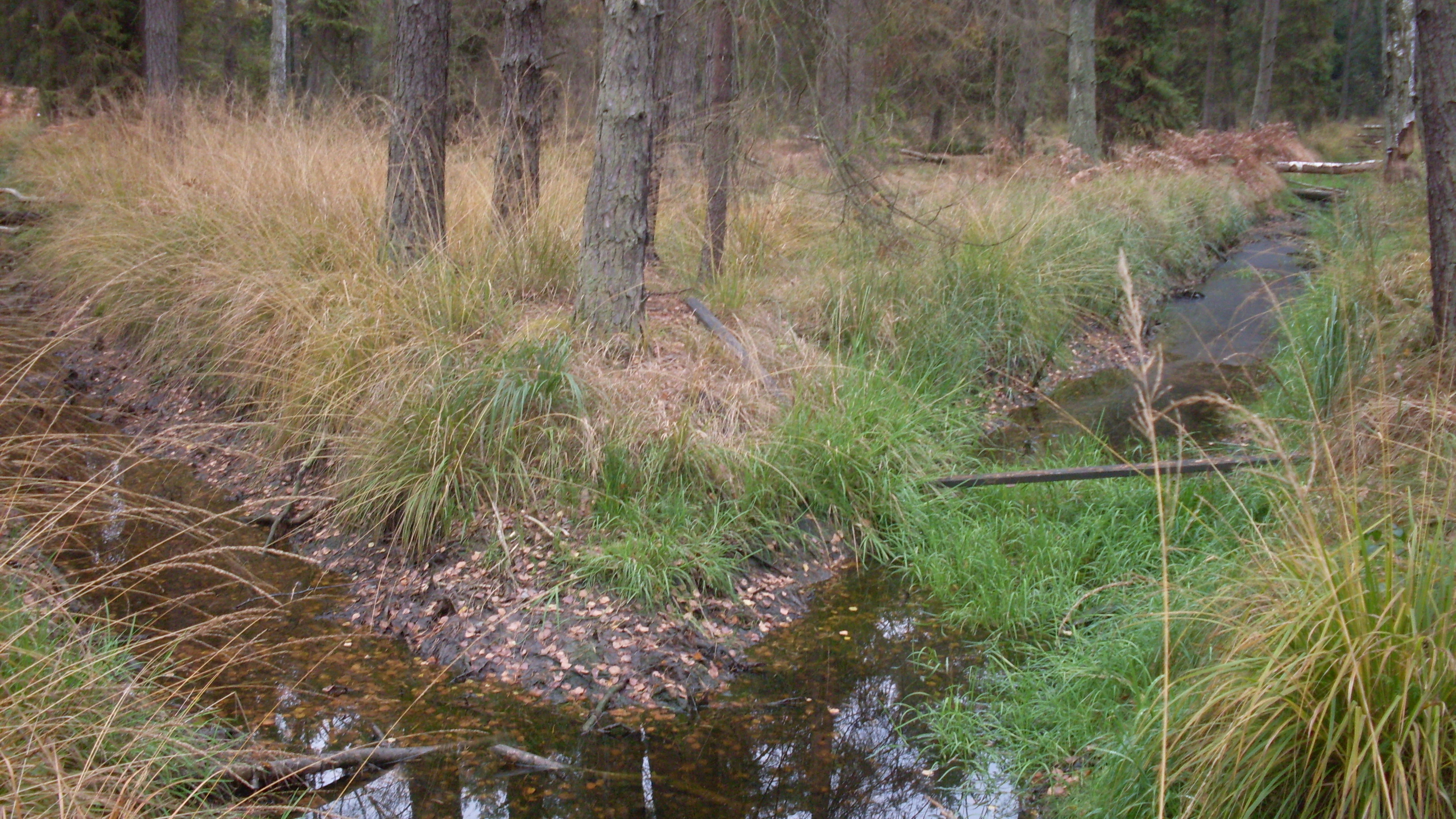 Potok Chechło w Puszczy Dulowskiej